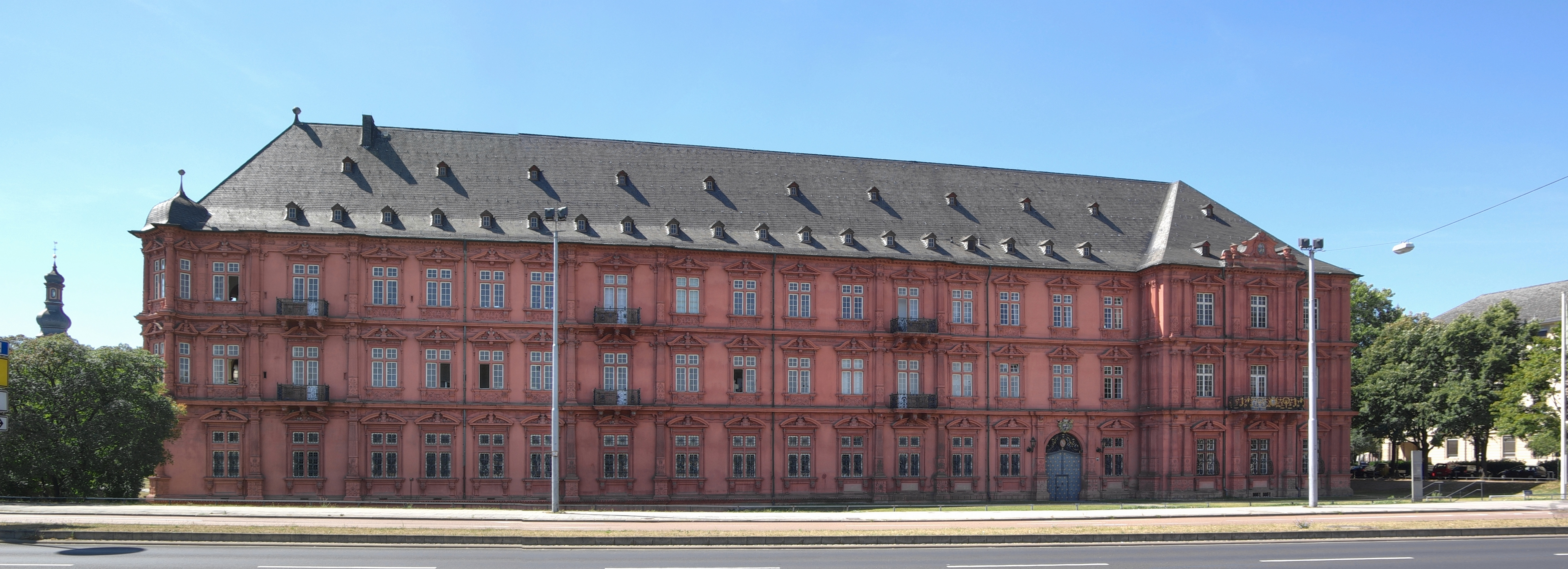 Mainz, Residenzschloss von Nordost